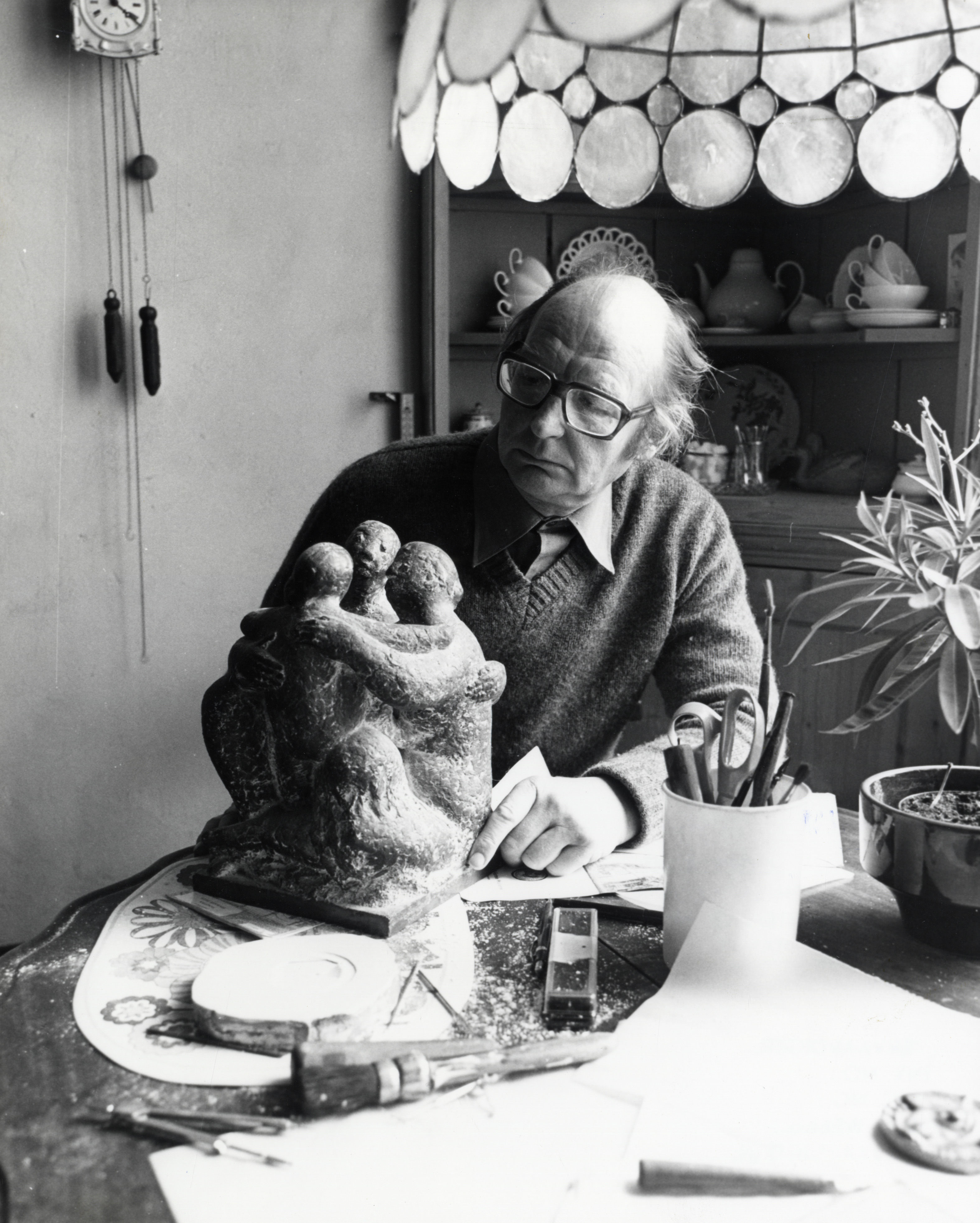 Portret van Johan Christiaan (Joop) Hekman, geboren Utrecht 24 maart 1921, beeldhouwer te Utrecht, overleden Utrecht 28 december 2013. Te halve lijve van voren, zittend aan een tafel in zijn woning, Nieuwegracht 105 te Utrecht, met een model van zijn beeld 'zittende familie', bestemd voor het bolwerk Zonnenburg.